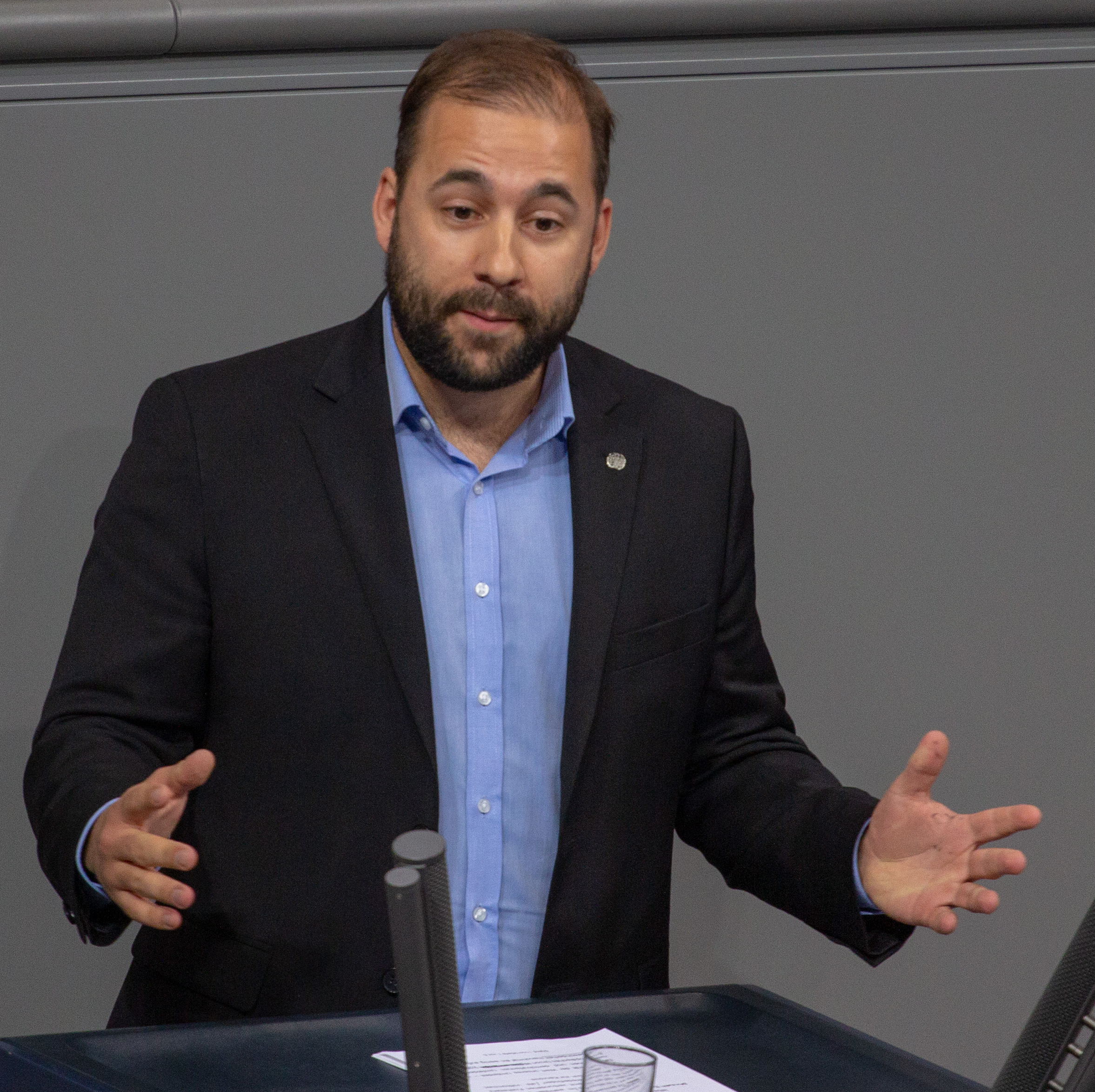 Johannes Schraps, Mitglied des Deutschen Bundestages, während einer Plenarsitzung am 11. April 2019 in Berlin.